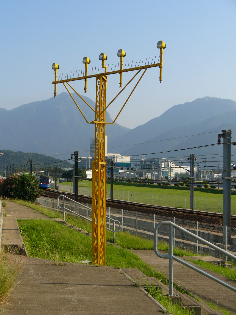 中文（香港）: 導航燈